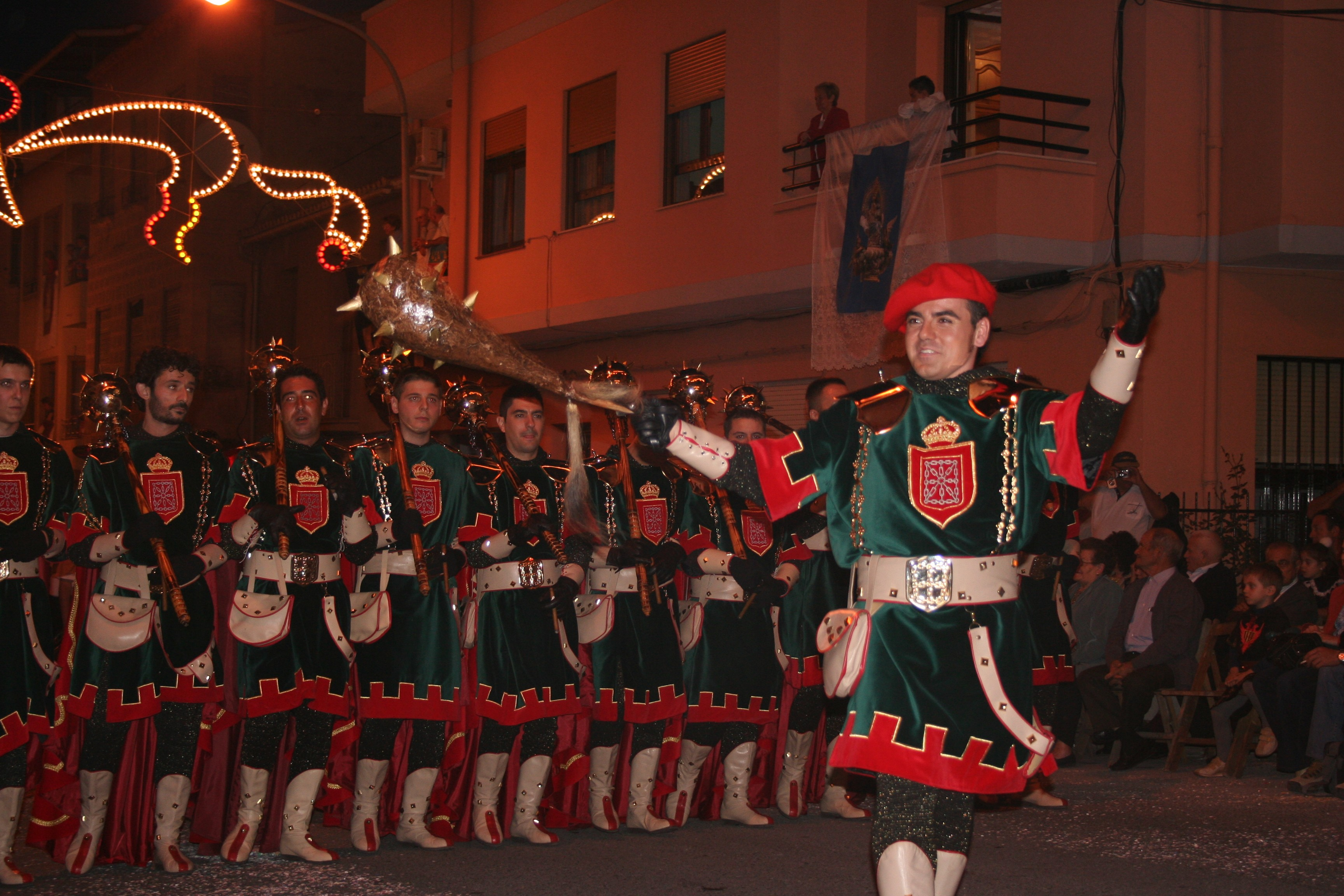 Desfile en la fiesta de Moros y Cristianos